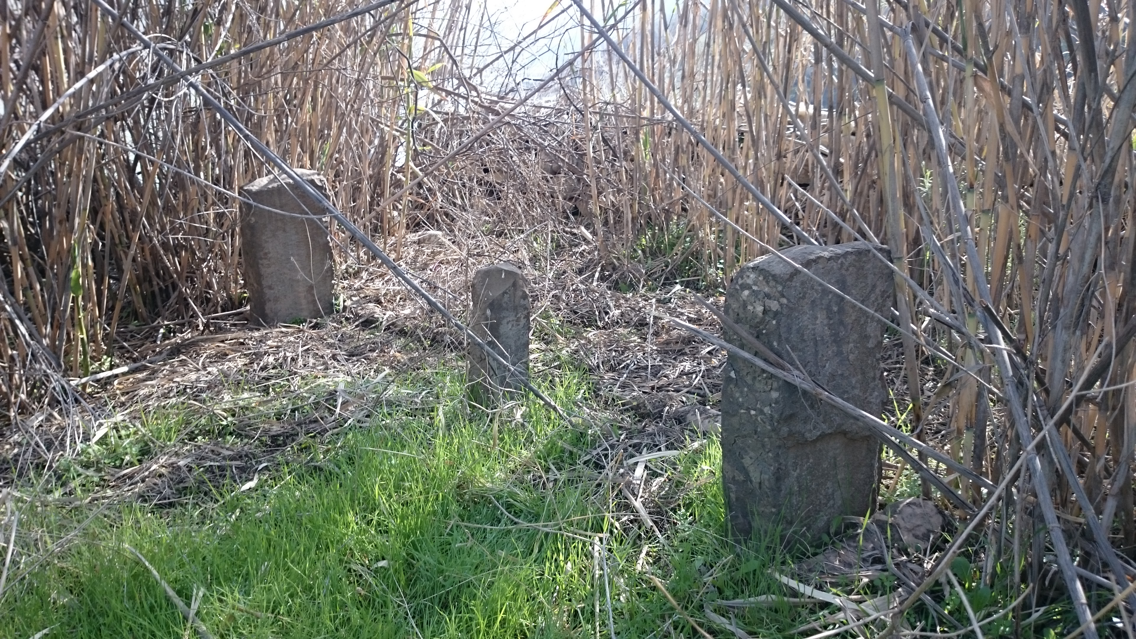 نگاره‌ای از قبر خلیفه کیخسرو امامی (به‌احتمال بسیار زیاد) و یا پسرش خلیفه هومر امامی (به‌احتمال بسیار کم) در نزدیکی و بین دو روستای کلور و کانی‌سالار از توابع بخش کلاشی شهرستان جوانرود در استان کرمانشاه. در نقطه صفر مرزی ایران و عراق و در کنار دو رود لیله و سیروان. کوردی: گۆڕی خەلیفە کەیخەسرەوی ئیمامی (بەئیحتیمالی زۆر) یان کوڕەکەی خەلیفە یانی خەلیفە هۆمەری ئیمامی (بەئیحتیمالی کەم) لە نزیکیی و ناوبەینی دو گوندی کولور و کانی سالار سەر بە بەشی کڵاشی شارستانی جوانڕۆ لە پاریزگای کرماشان. لە دواهەمین سنووری ئێران و عێراق و لە گۆی دووڕووباری لێڵە و سیروان.